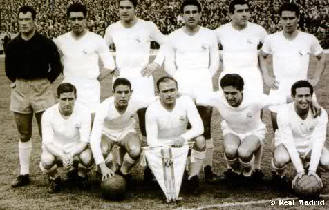 Equipo que venció al Manchester en semifinales: Alonso, Becerril, Marquitos, Lesmes, Muñoz, Zárraga. Agachados: Kopa, Mateos, Di Stéfano, Rial y Gento